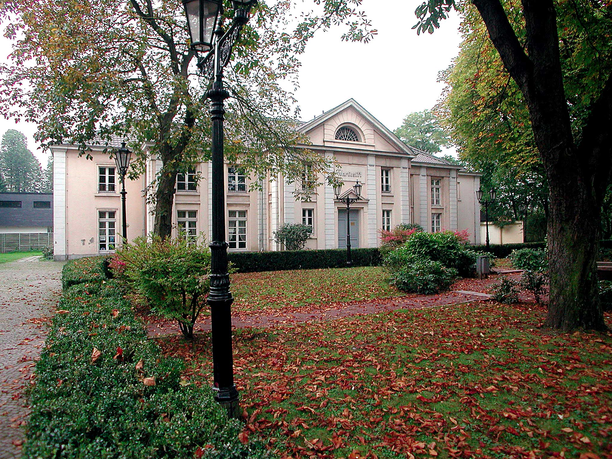 Das ehemalige Martinsstift und heutige Musikschule in Moers